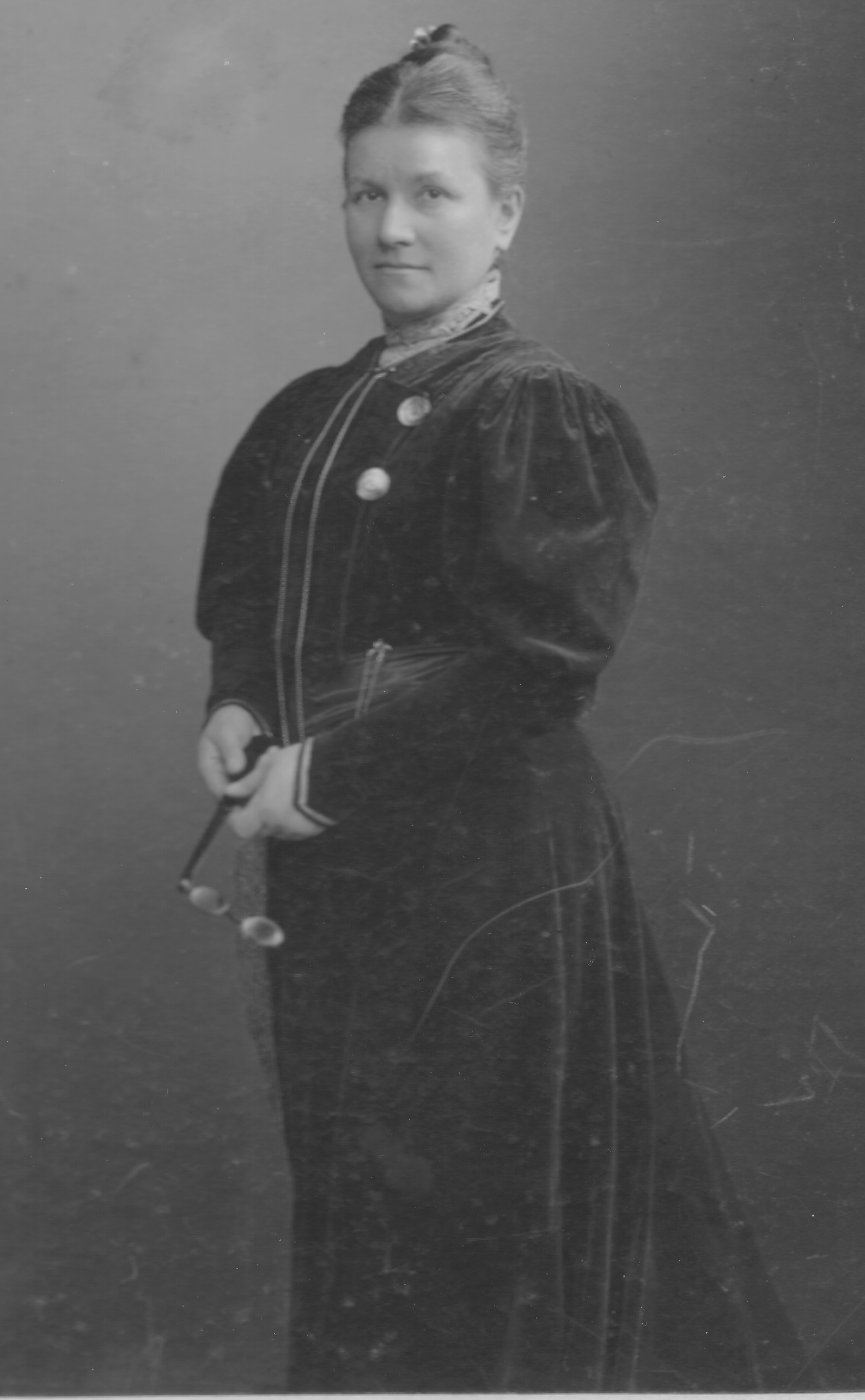 Fotografie von Gertrud Dalen († 1939)